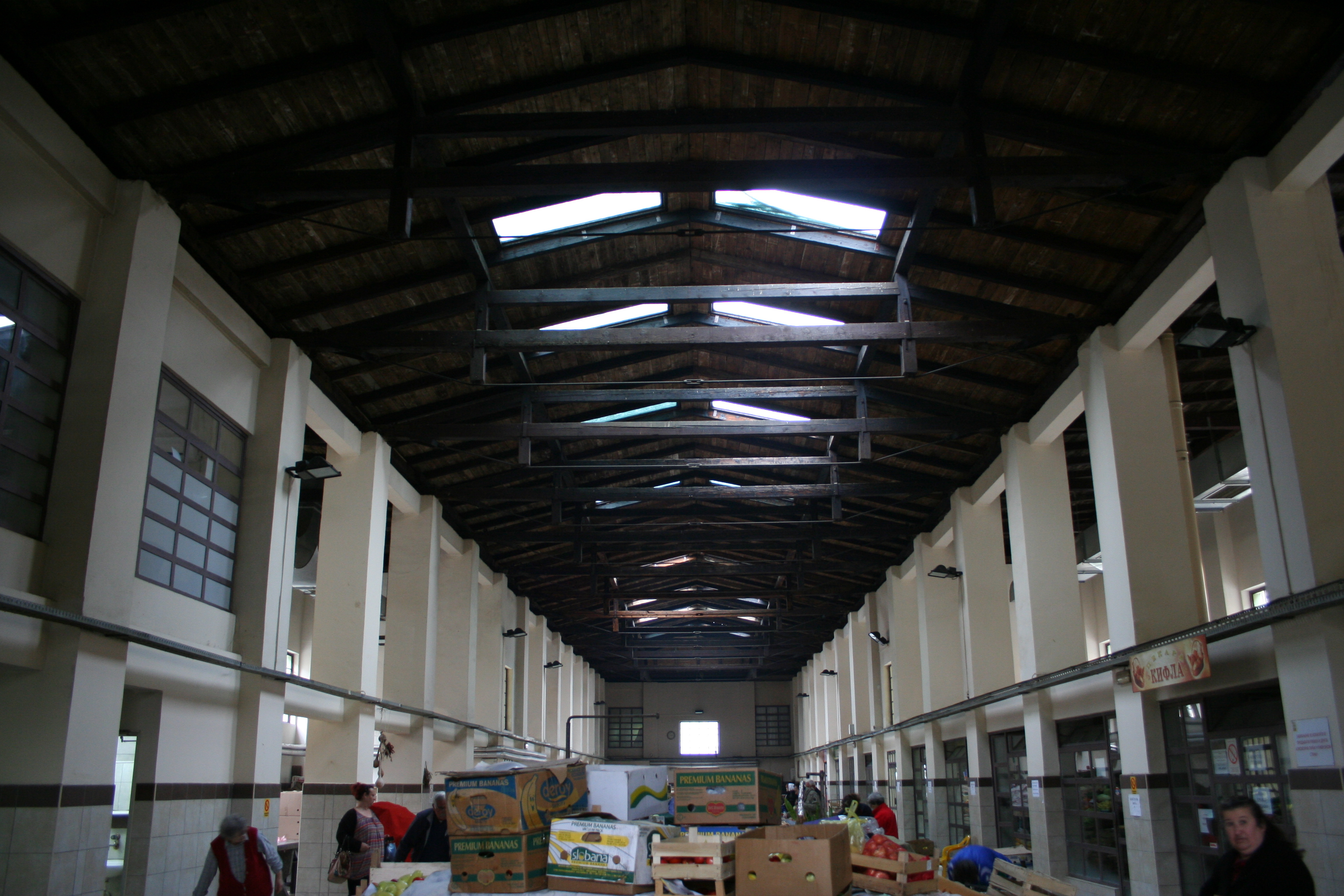 Zgrada gradske tržnice , Šabac